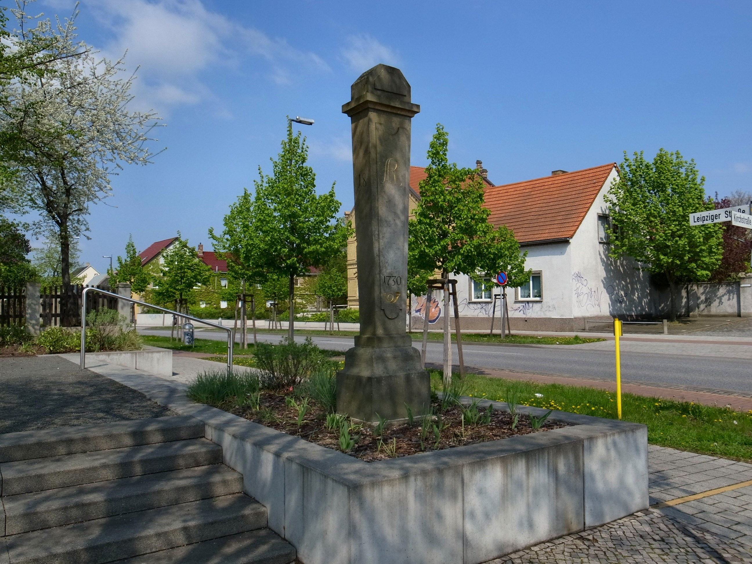 Wolfen,Kursächsische Postmeilensäule,Halbmeilensäule